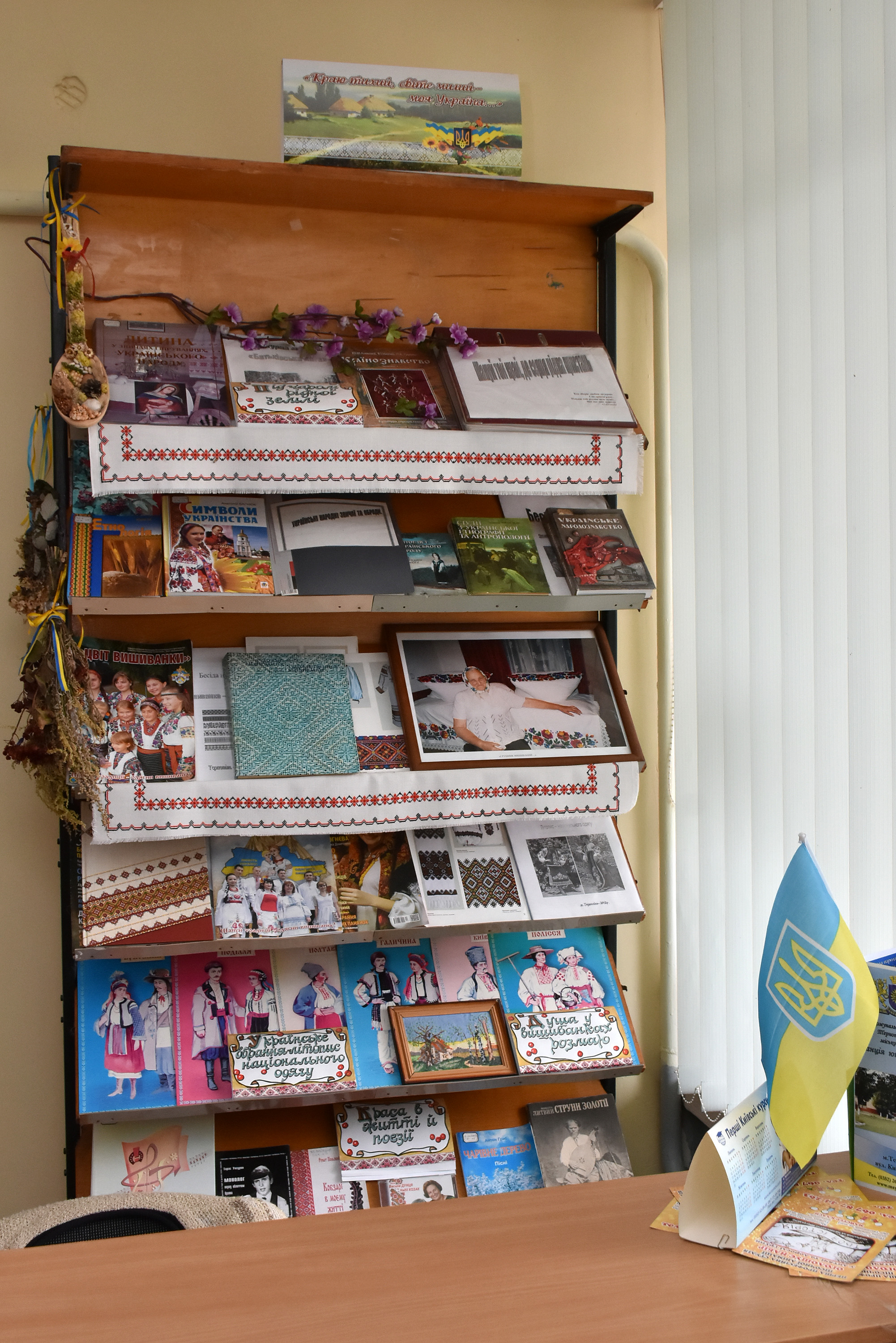 Бібліотека № 5 для дорослих Тернопільської міської централізованої бібліотечної системи.